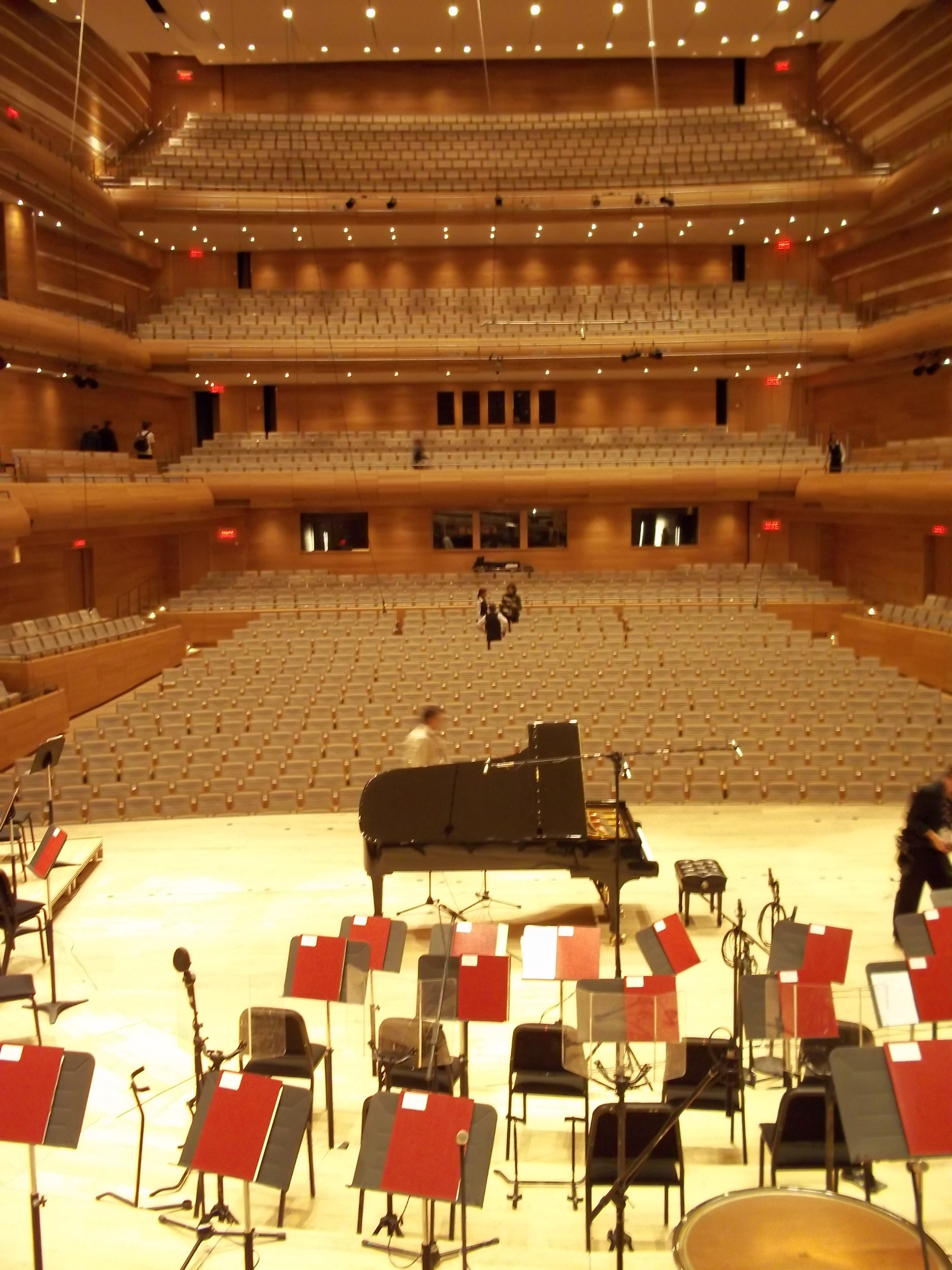 Maison symphonique de Montréal